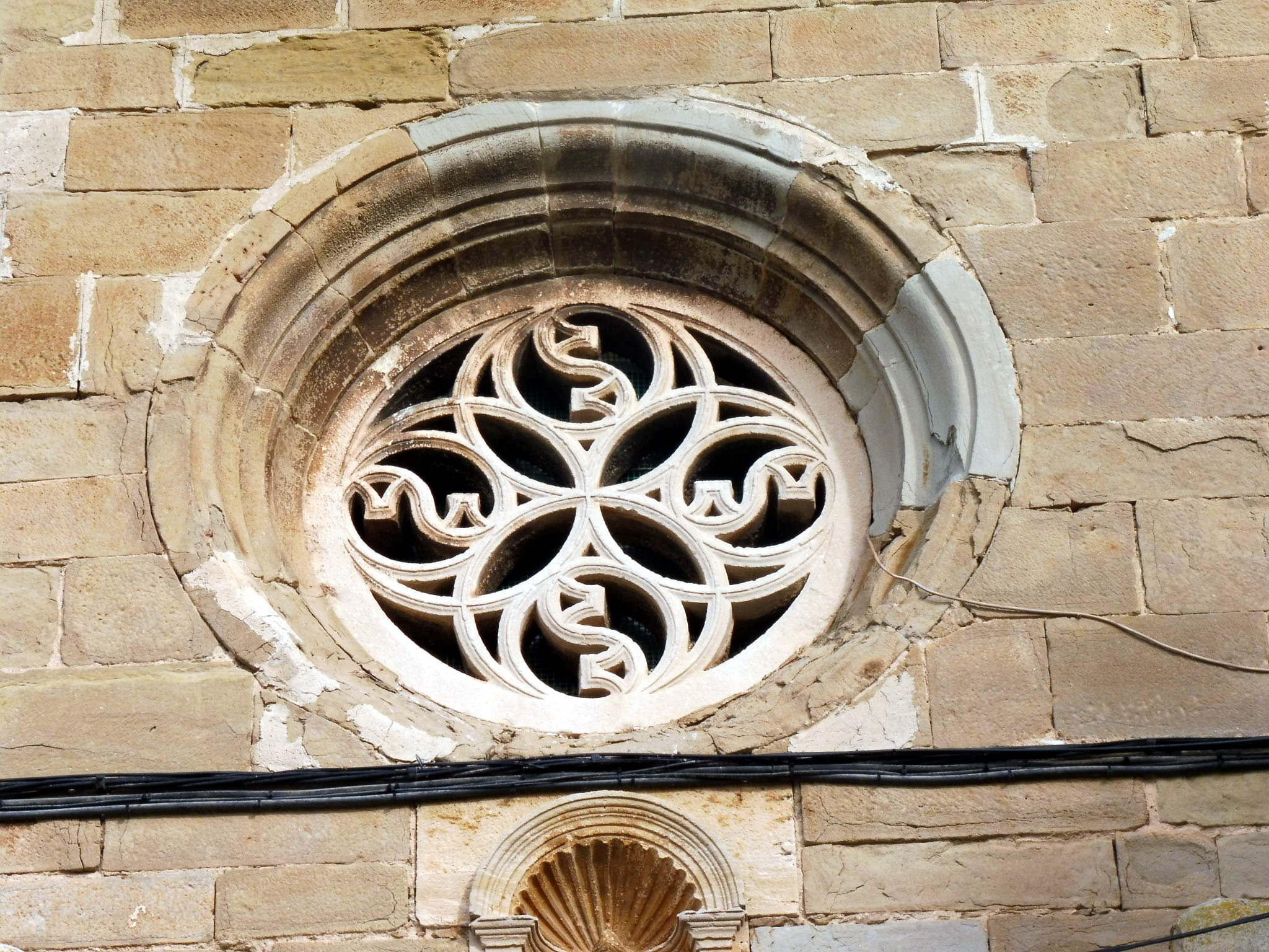 Església de Sant Josep de Bellmunt d'Urgell: ull de bou